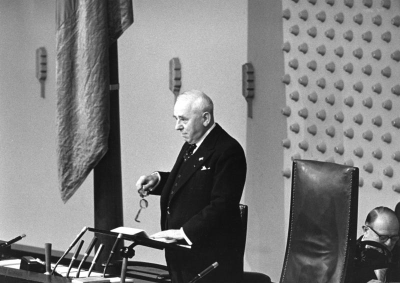 Konstituierende Sitzung des 4. Deutschen Bundestages Robert Pferdmenges, Bankier geb. 27.3.1880, gest. 18.9.1962 1950 - 1962 Mitglied des Bundestages 1961 Alterspräsident